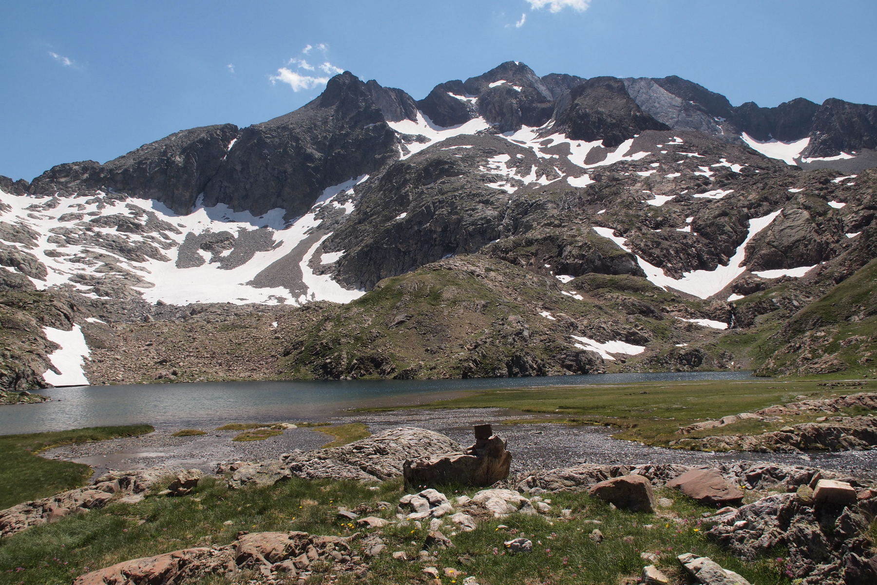 Puertos de Panticosa, Bramatuero y Brazatos This is a photography of a Site of Community Importance in Spain with the ID: ES2410040. Natura2000 entry, EEA entry